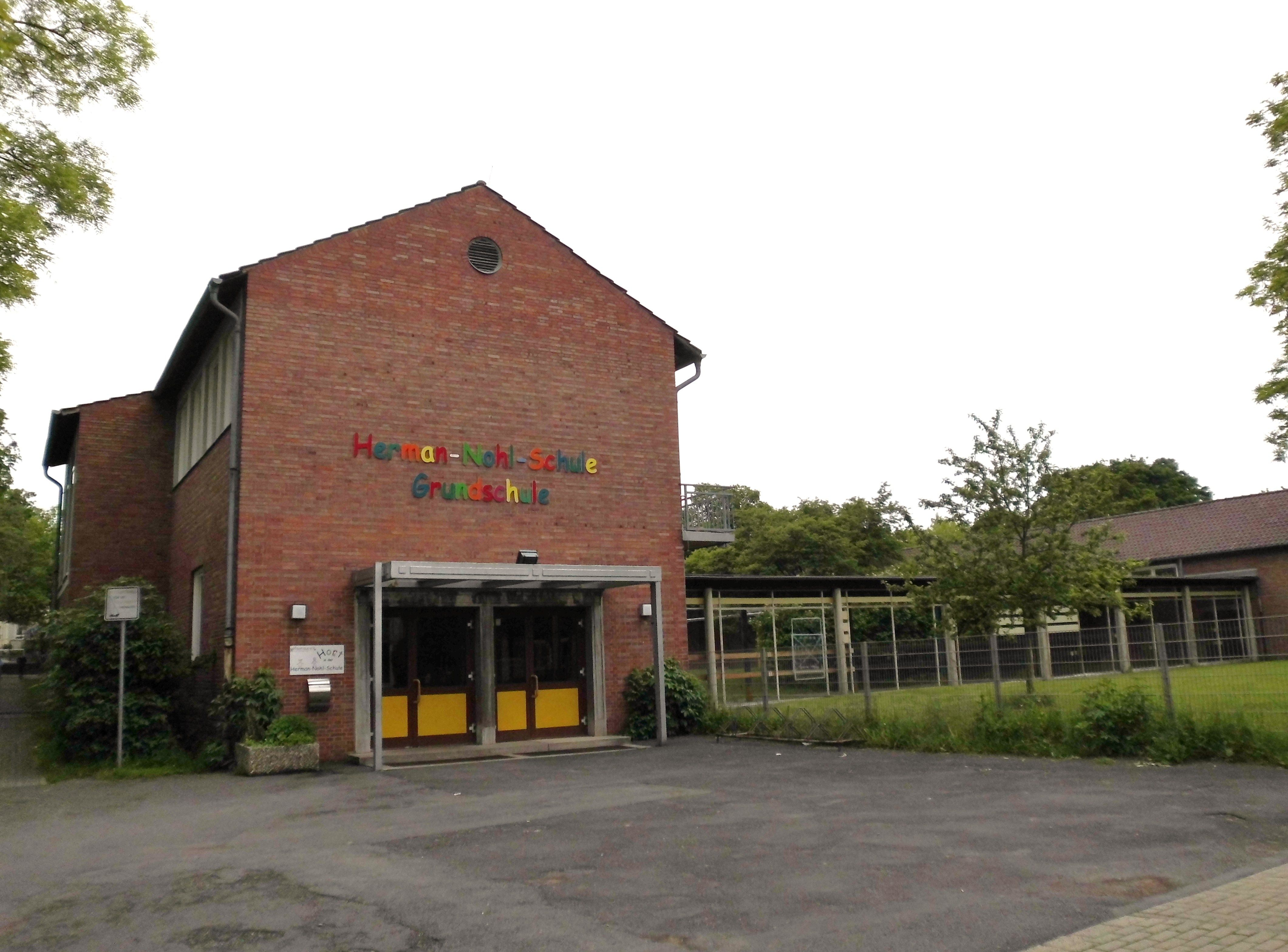 Haupteingang der Herman-Nohl-Schule, Grundschule in der Immanuel-Kant-Straße in der Südstadt von Göttingen. Erbaut 1955-1957 von dem Göttinger Architekten Diez Brandi, als Ensemble mit der daneben liegenden Schule (heute HG Junior, Unterstufengebäude ds Heinberg-Gymnasiums) und der Kreuzkirche.